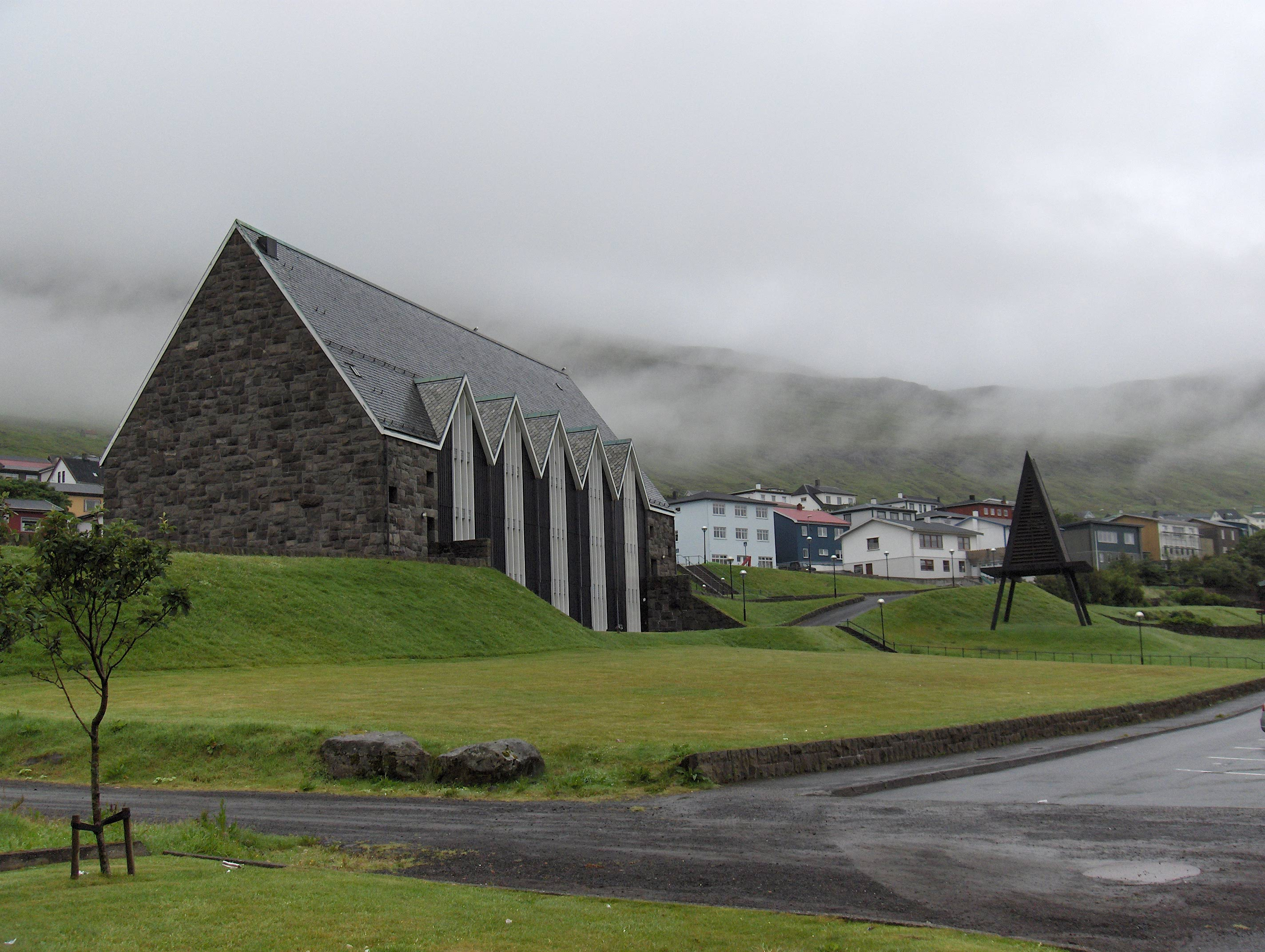 Klaksvik Church, Faroe Islands